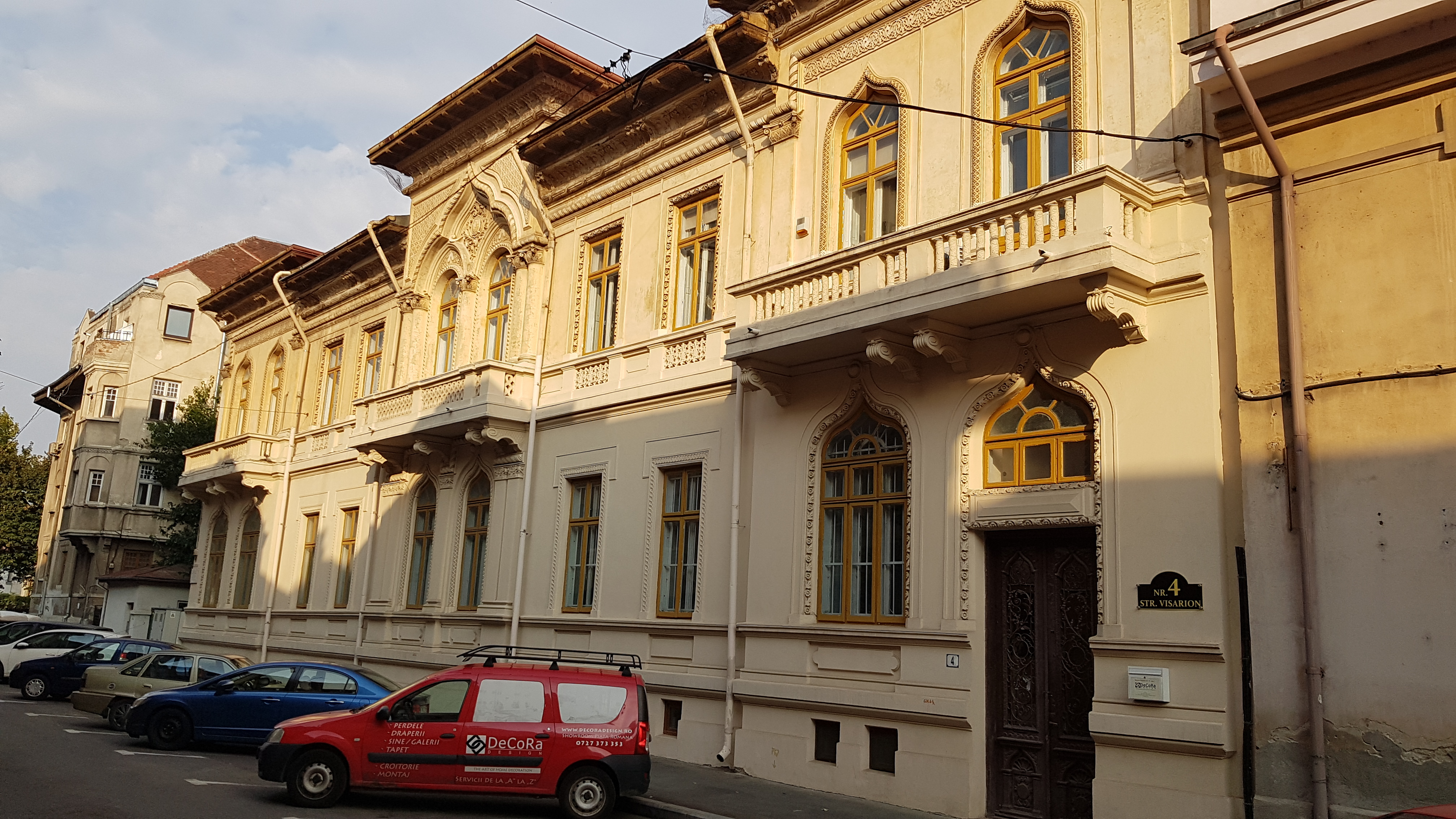 Casă, monument istoric